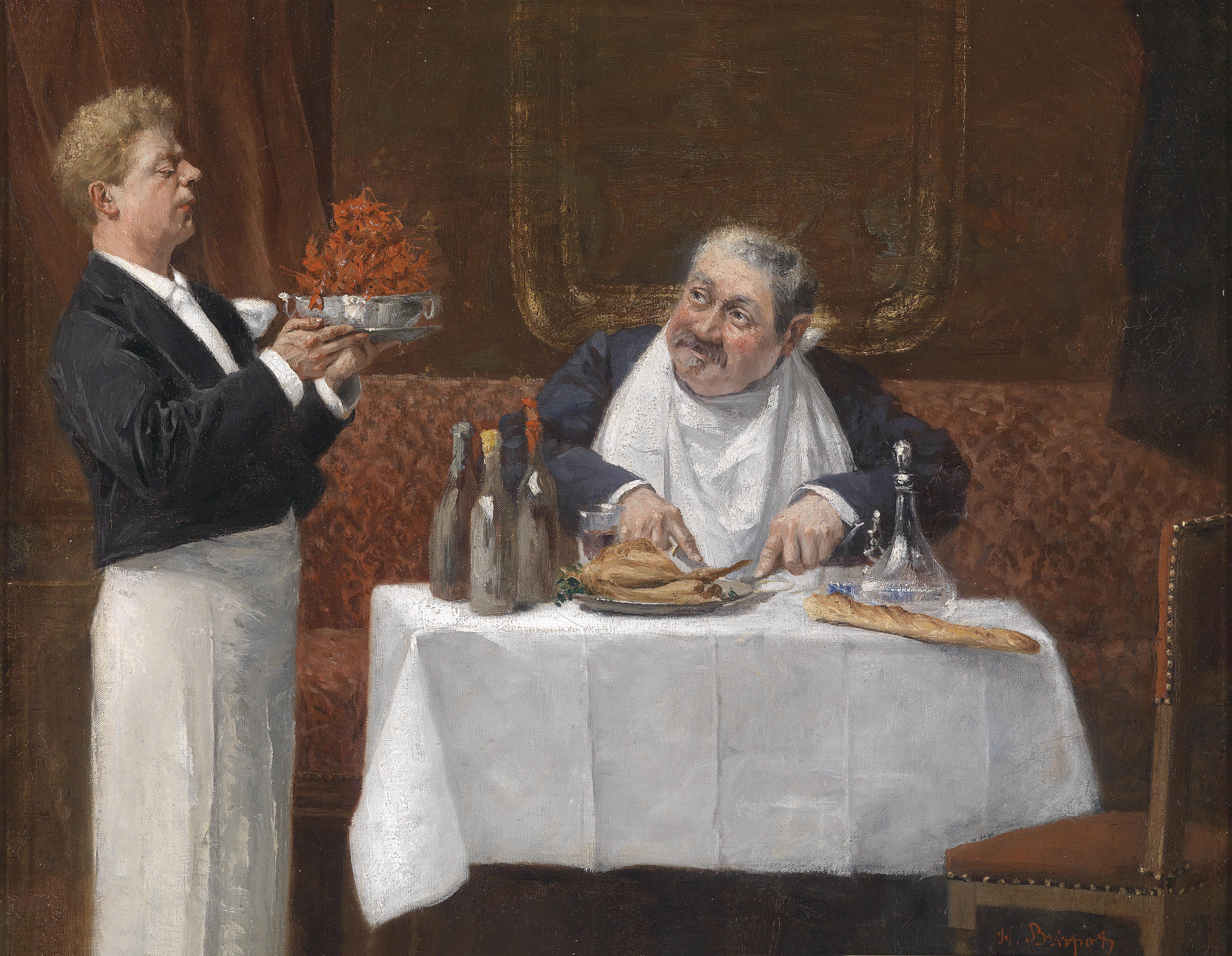 Ein Gourmand